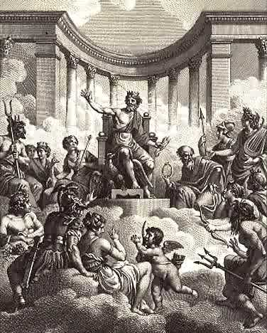 Nicolas-André Monsiau, Les douze Olympiens.